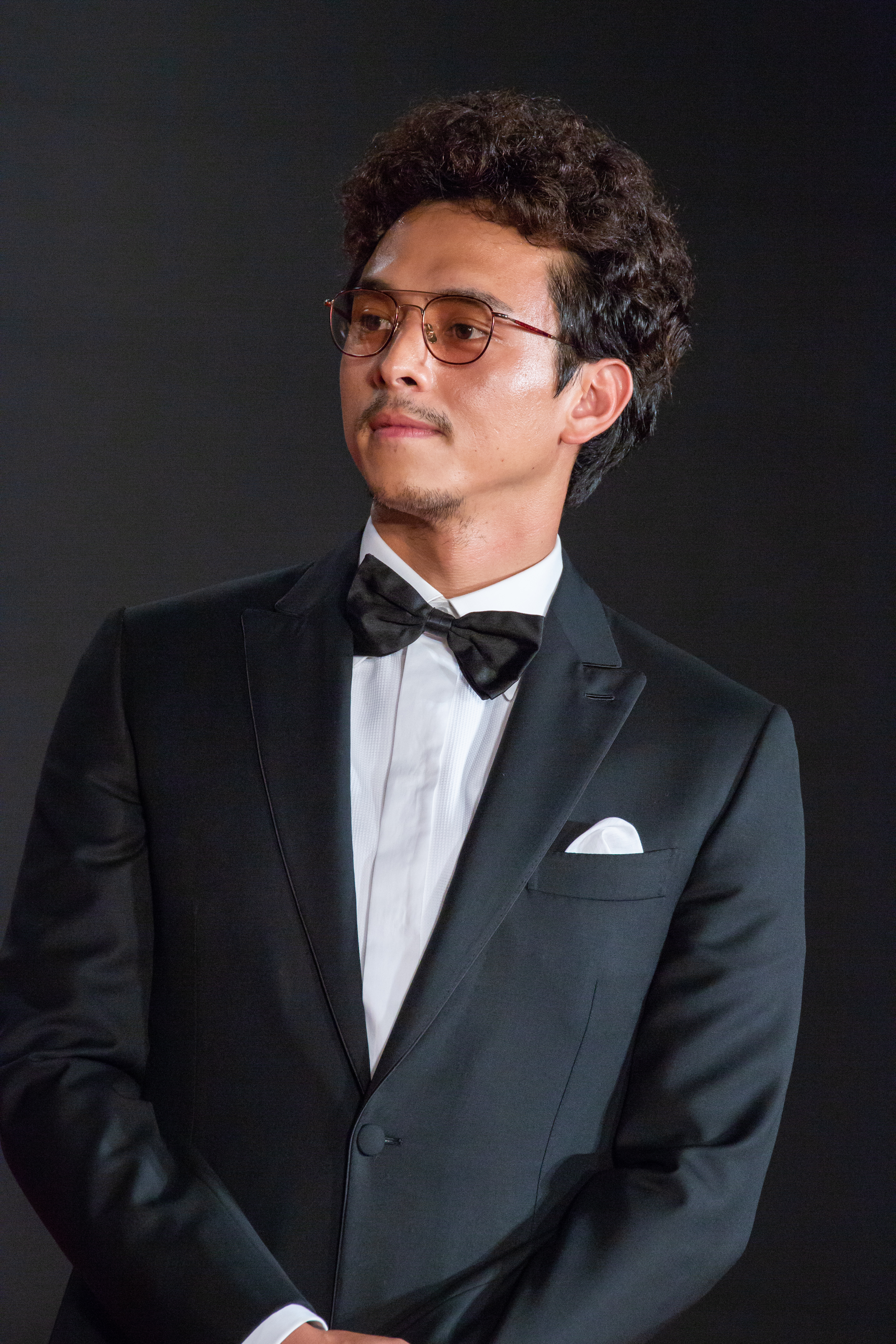 ジュラシック・ワールド/炎の王国 ジャパン・プレミア レッドカーペット 満島真之介